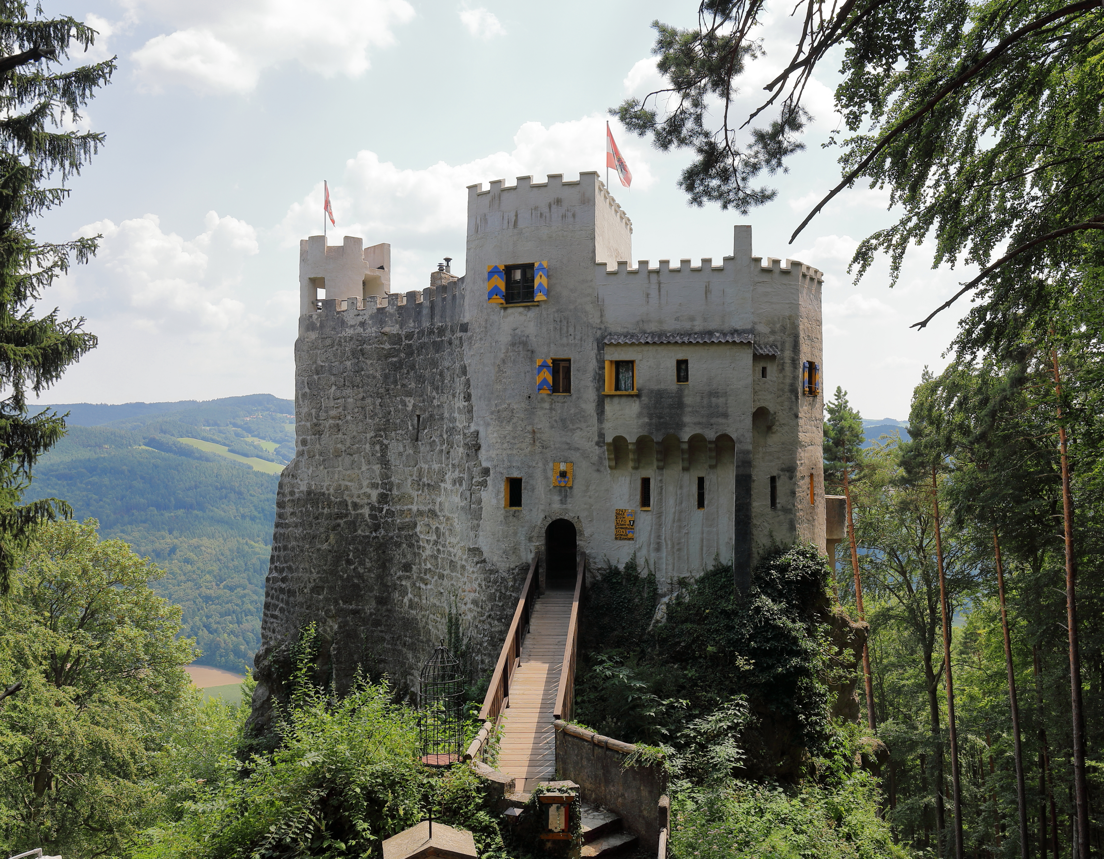 Nordwestansicht der Burg Grimmenstein in der niederösterreichischen Marktgemeinde Grimmenstein. Nach einem Verfall wurde sie in den 1960er Jahren teilweise in neoromantischen Stil wieder aufgebaut.